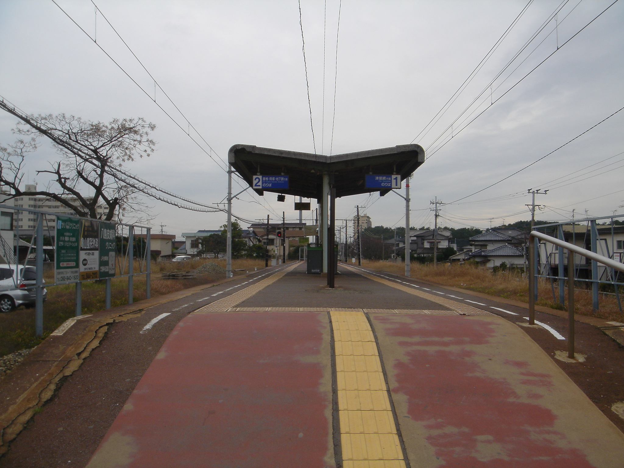 西鉄古賀駅ホーム